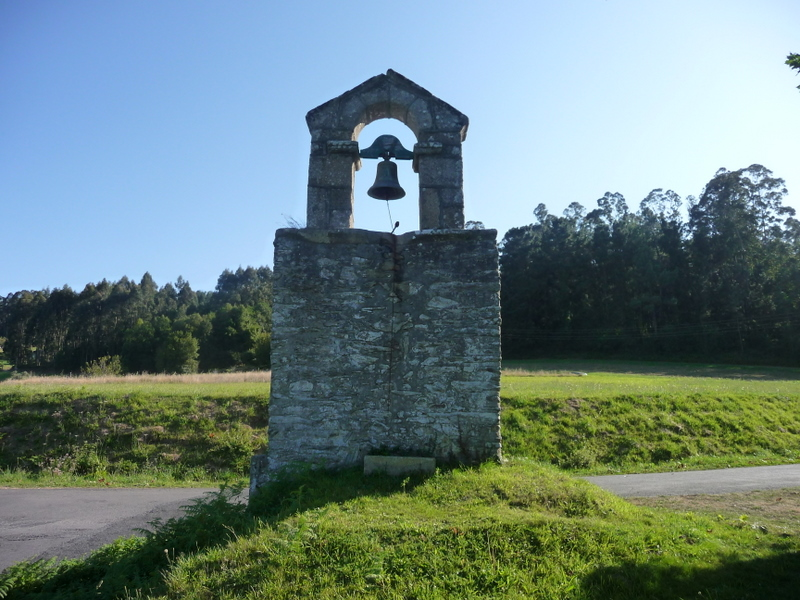 FOTO ORIGINAL